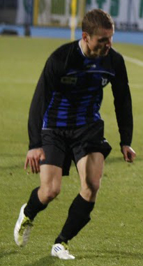 Adrian Błąd podczas meczu pomiędzy Zawiszą Bydgoszcz i Wartą Poznań w I lidze